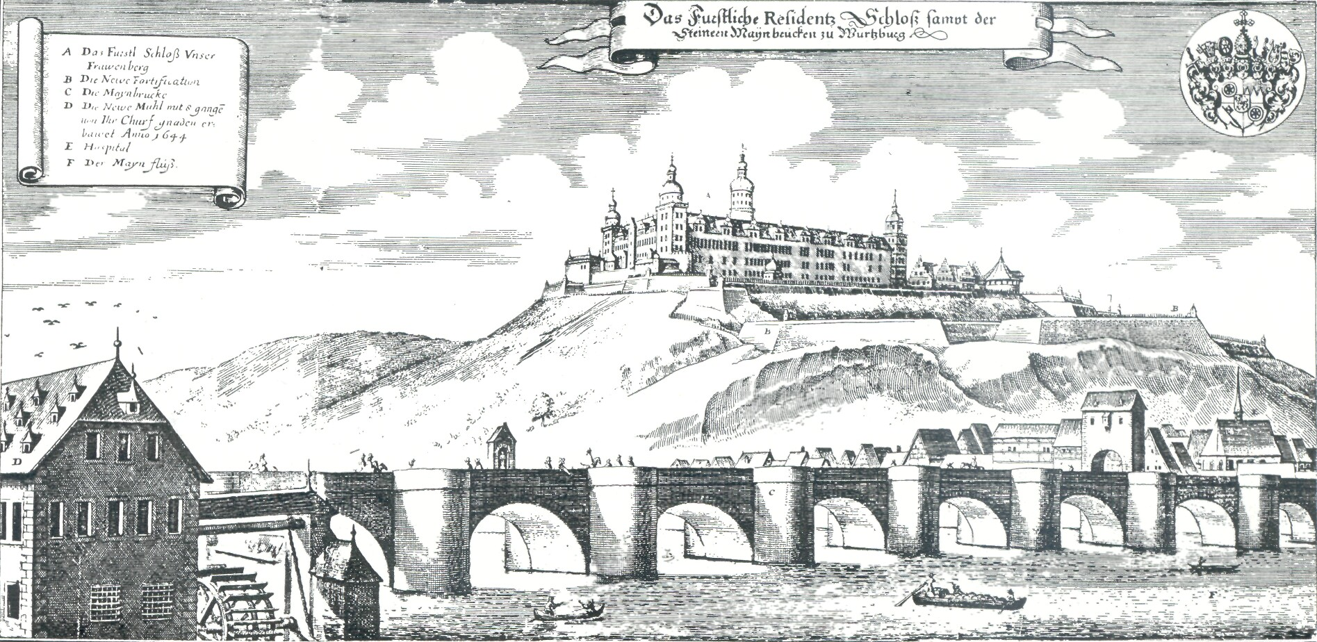 Würzburg, Old Mainbridge, 1648